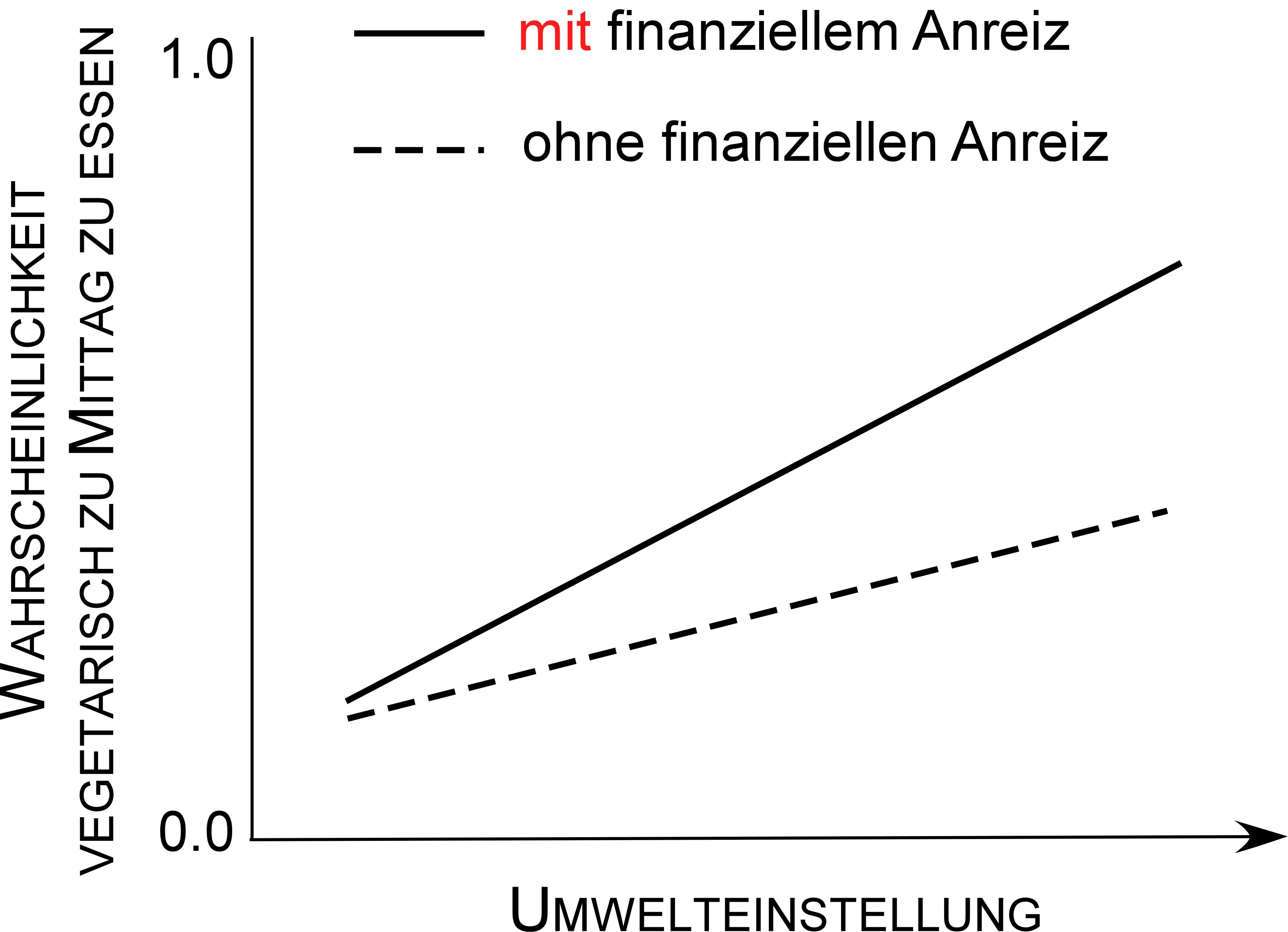 grafische Darstellung eines konjunktiven Zusammenhangs